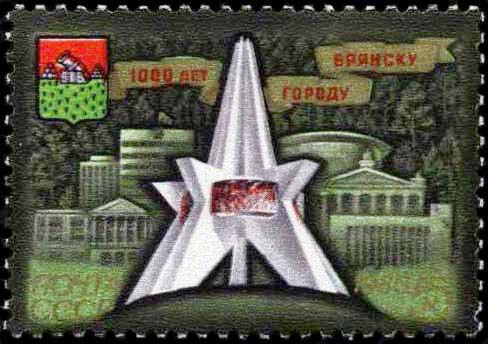 Марка СССР «1000 лет городу Брянску», 1985 г., 5 коп.